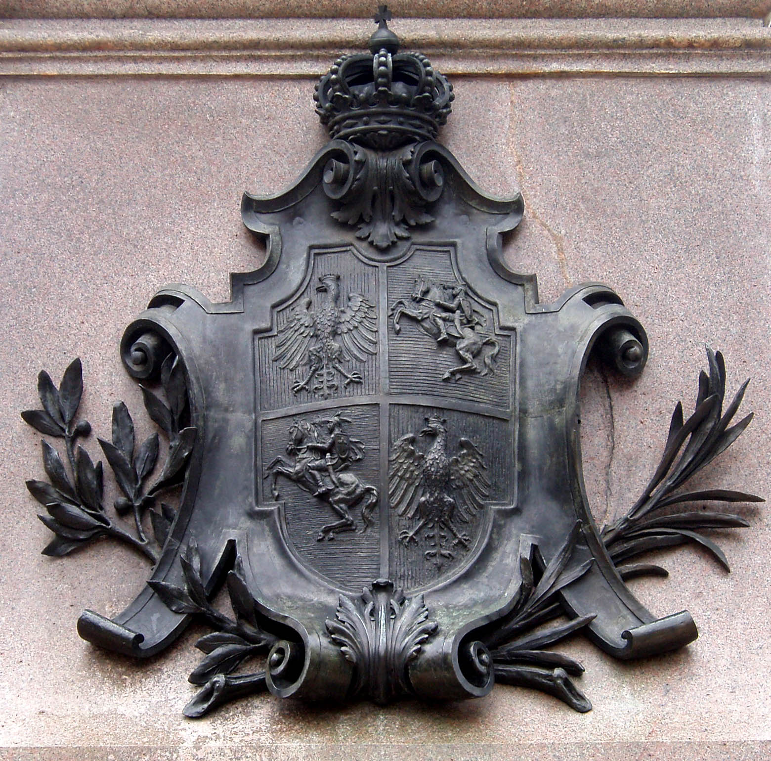 Картуш на тильній стороні пам'ятника Міцкевичу у Львові.